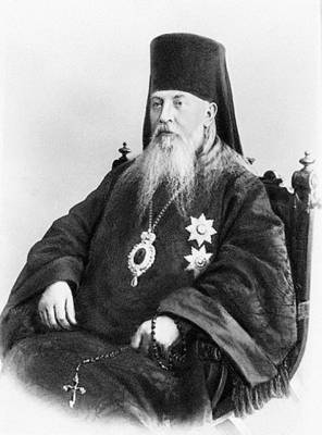 Агафангел (Преображенский), архиеп. Рижский.